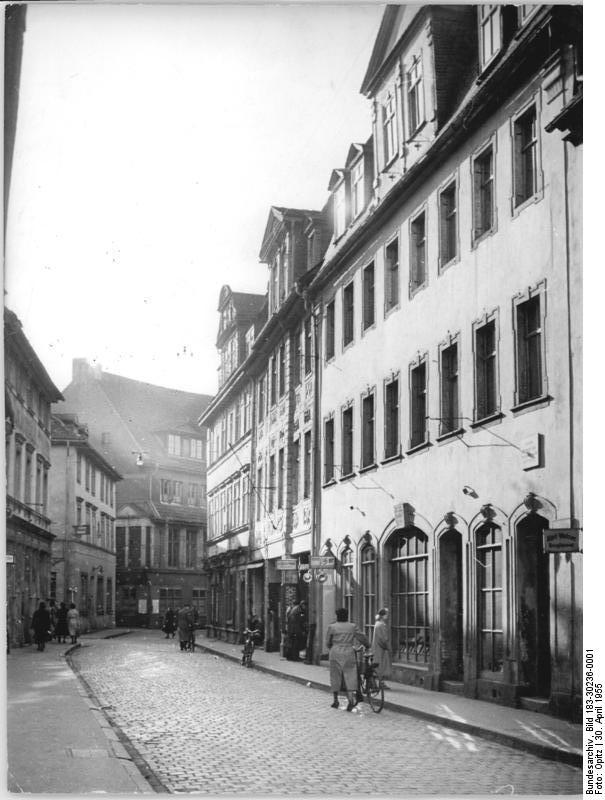 Weimar, Windische Gasse, Schillerhaus, Schillermuseum Zentralbild TBD-Opitz 2 Motive 30.4.1955 Schiller-Wohnhaus in Weimar (1799-1802) In Weimar bezog Friedrich Schiller zuerst eine Wohnung in der Windischen Gasse. Er wohnte hier von 1799-1802. Danach zog er in das "Schillerhaus", heute als Schiller-Museum eingerichtet. UBz: Schiller-Wohnhaus in der Windischen Gasse zu Weimar.